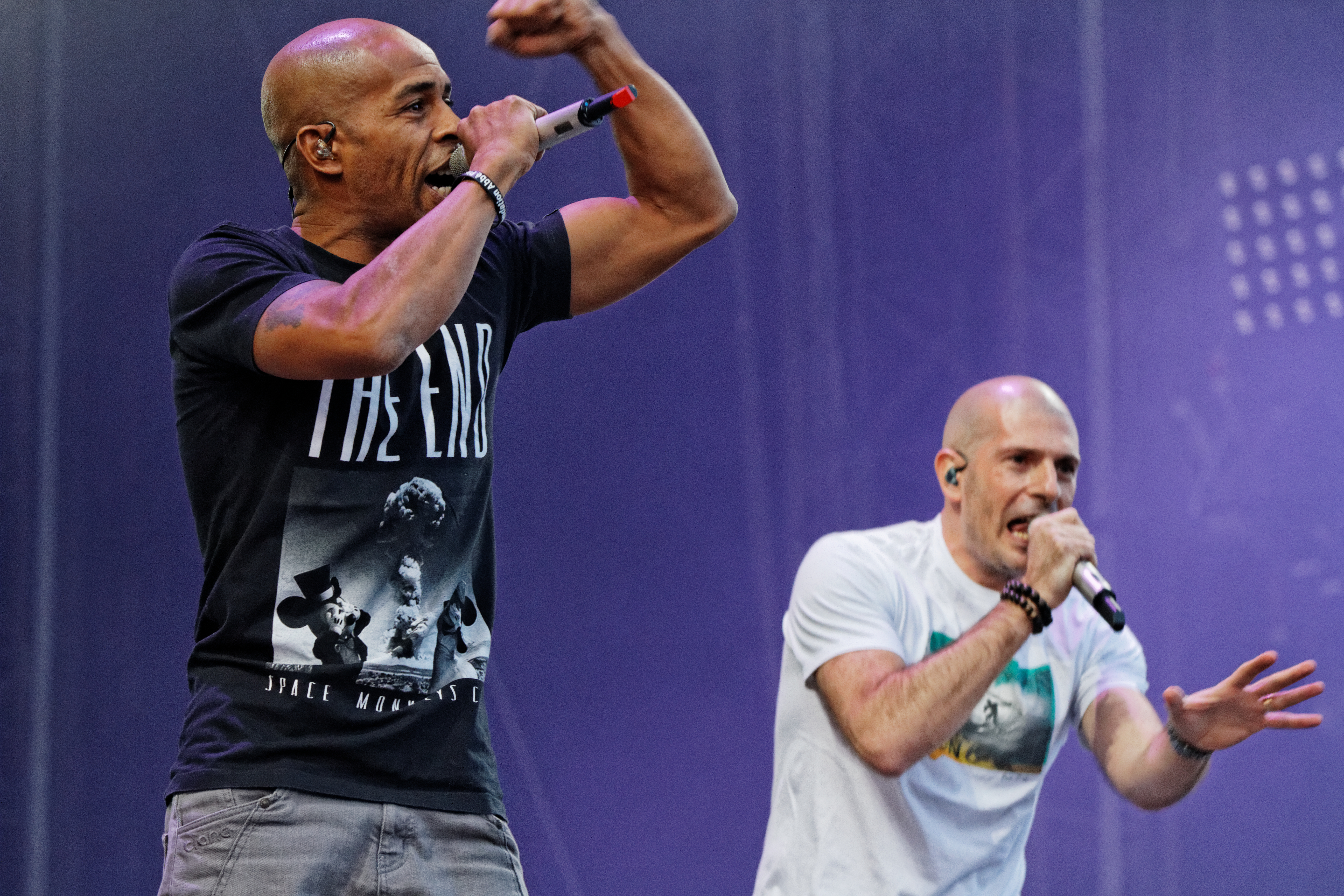 IAM en concert sur la grande scène lors de la fête de l'Humanité 2014.